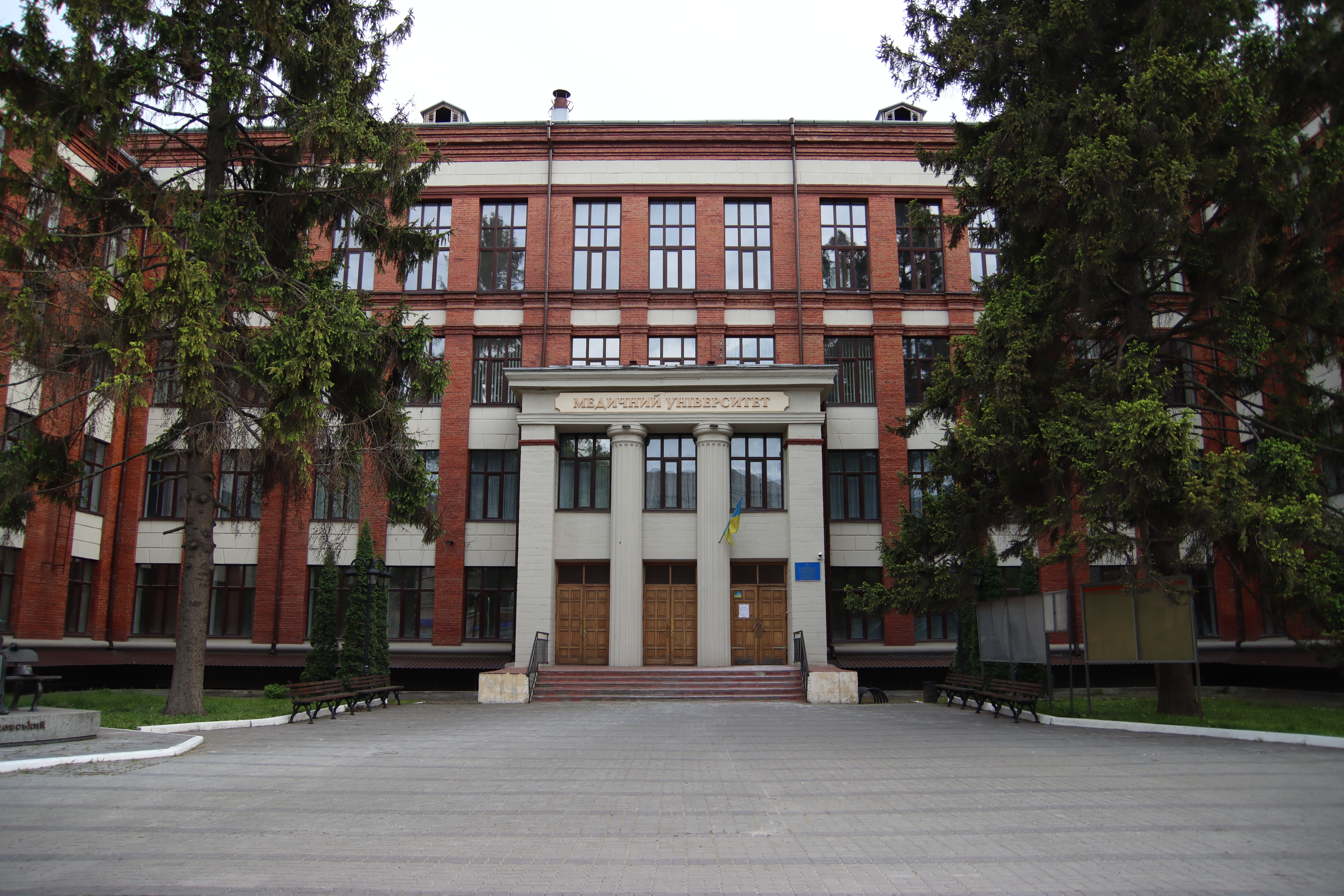 Фасад Морфологічний корпус Тернопільського медичного університету